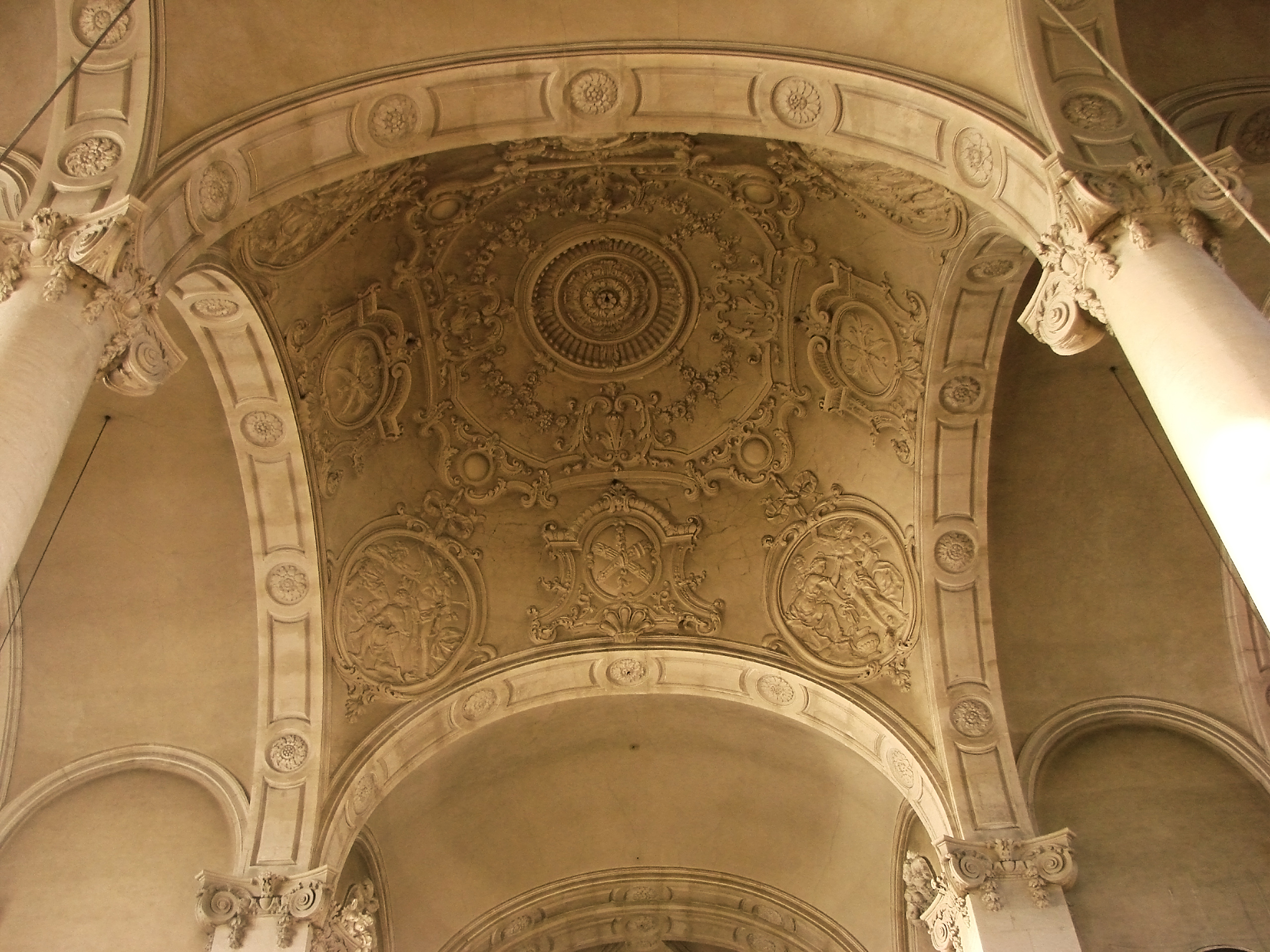 Voûte du choeur de l'église Saint-Sébastien de Nancy.